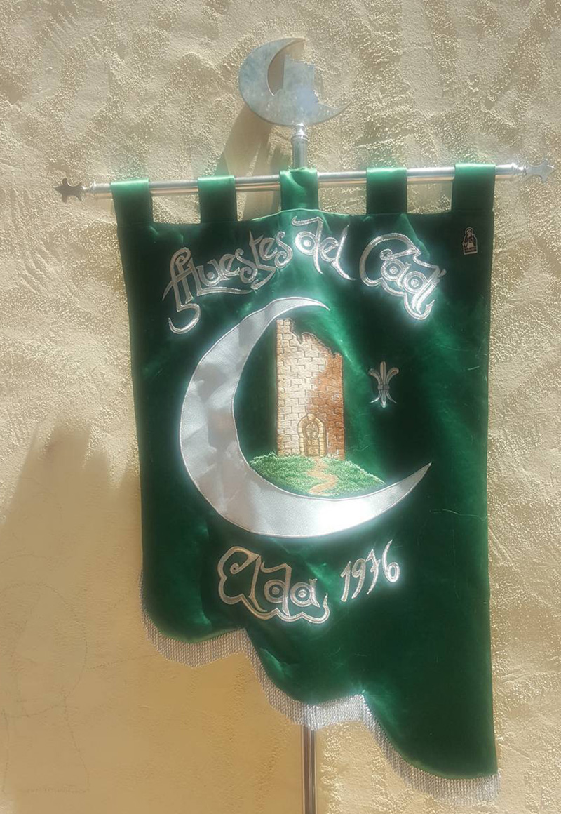 Estandarte de la Comparsa Huestes del Cadí